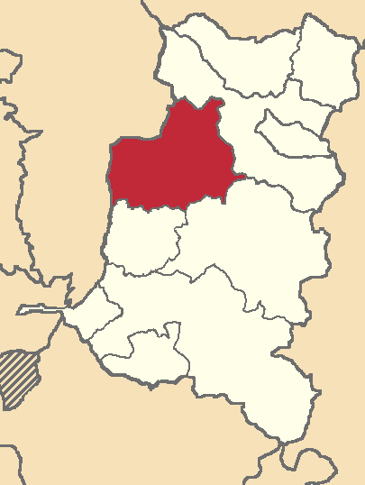 Mapa localizacor del cantón en Chimborazo, Ecuador